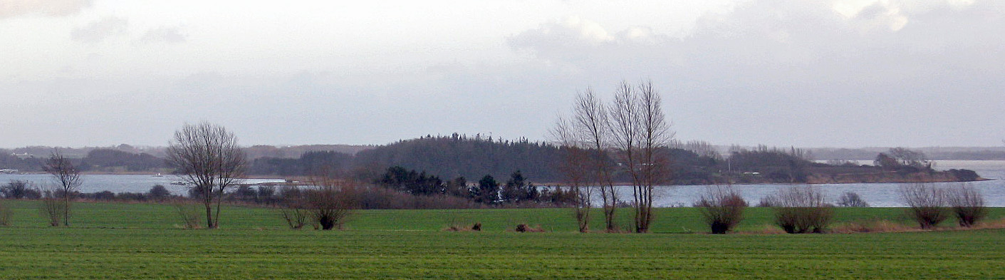 Fønsskov er en halvø i Lillebælt, på vestsiden af Fyn, sydøst for Middelfart.